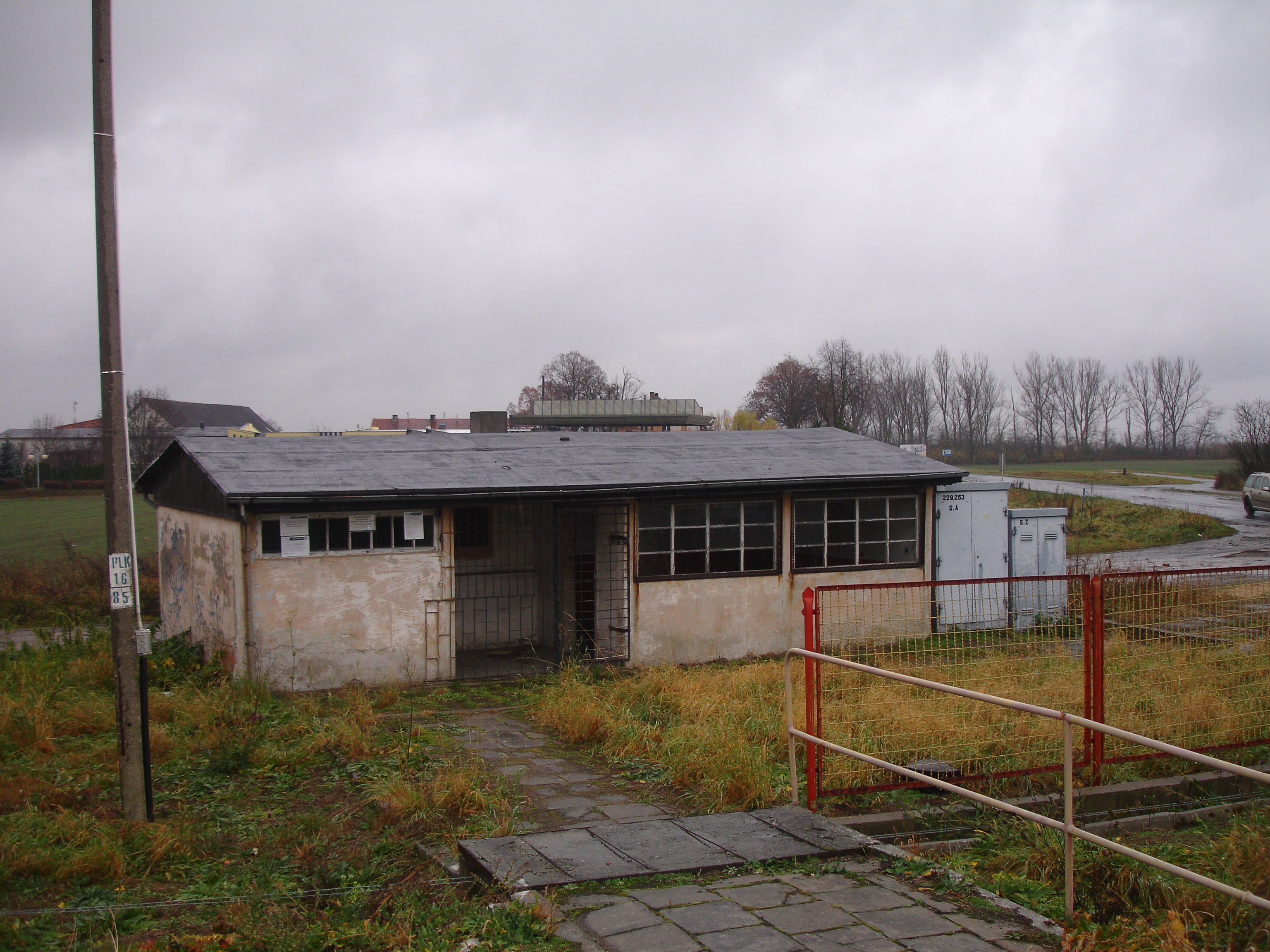 Budynek z kasą i poczekalnią na stacji Leszno Grzybowo.